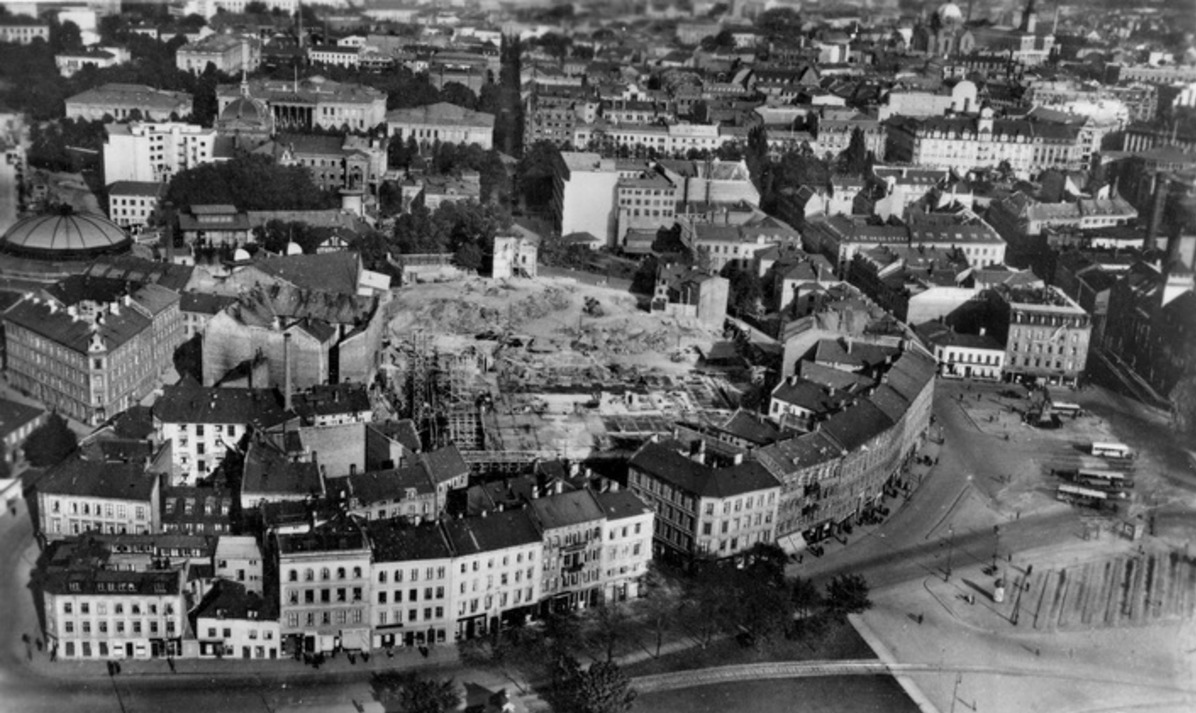 Byggingen av det nye rådhuset er i gang bak husrekken i Sjøgaten. Foto: Widerøe & Bjørneby/Oslo byarkiv, ca. 1932.